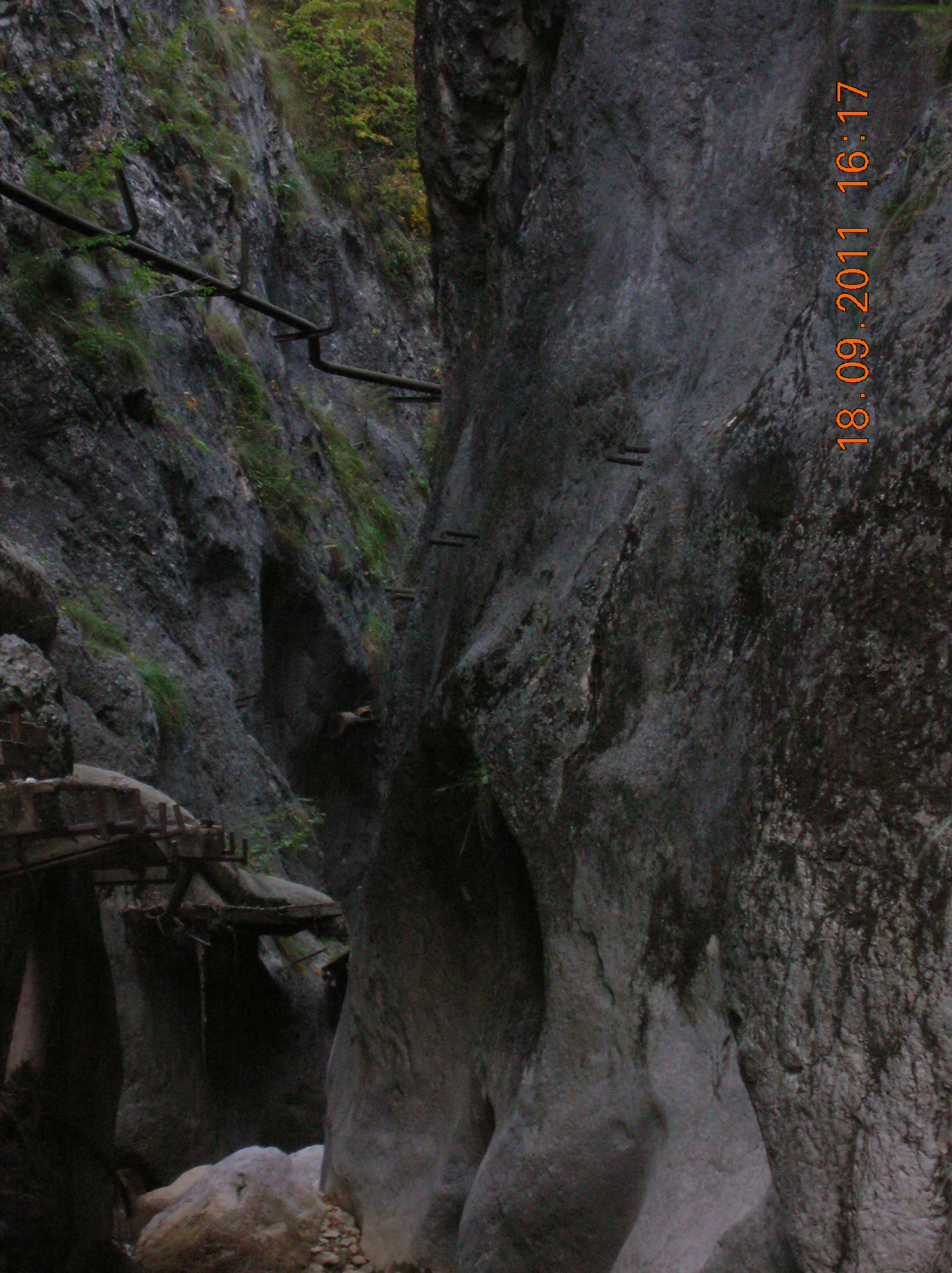 Cheile Şugăului, Rezervaţia Cheile Şugăului-Munticelu, Parcul Naţional Cheile Bicazului-Hăşmaş, Judeţul Neamţ, România